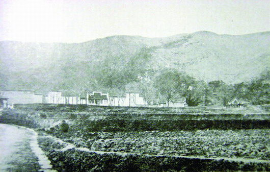 清末民初时期的岳麓书院和岳麓山